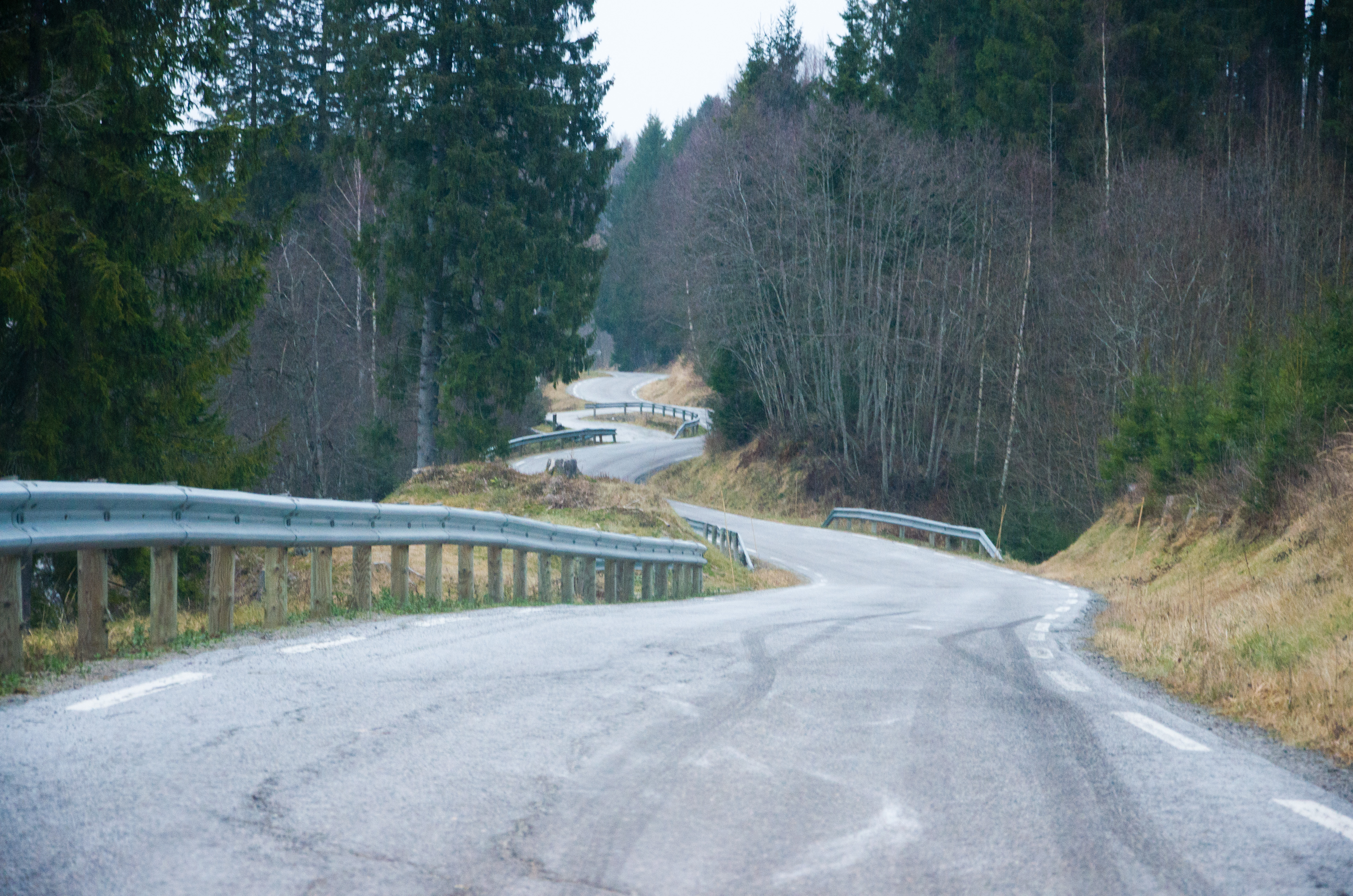 Fylkesvei 220 Østsideveien i Lardal, Vestfold